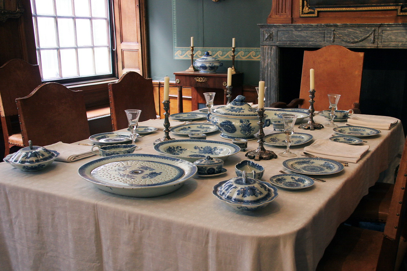 Stijlkamer van het Eysingahuis Stijlkamers van het Eysingahuis 08